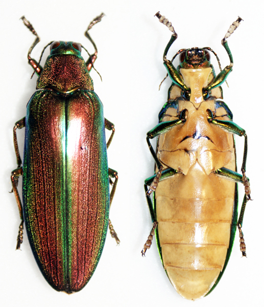 Buprestidae - In collection